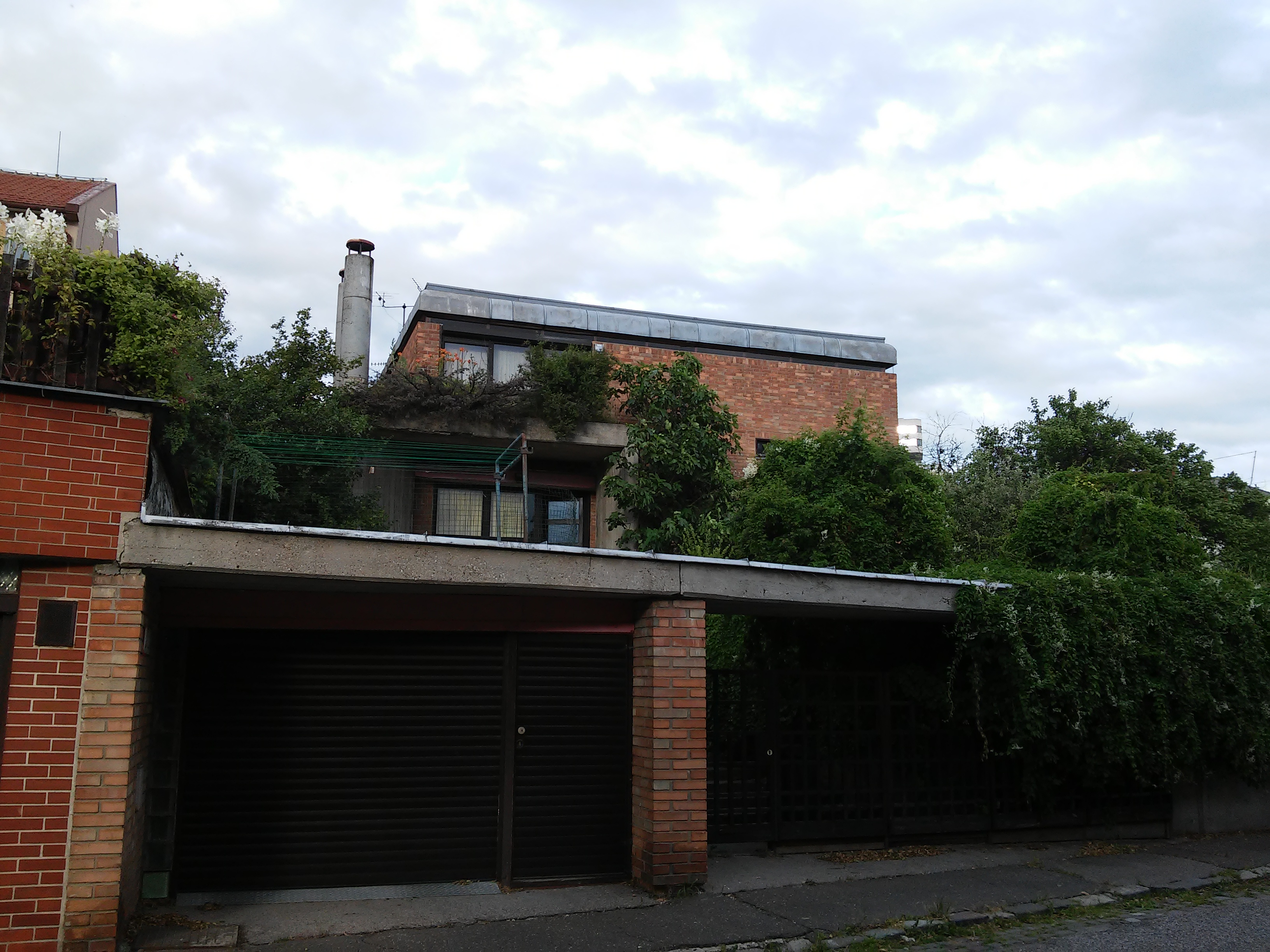 Rodinný dom Ivana Matušíka, Buková, Nad lomom, Staré Mesto, Bratislava